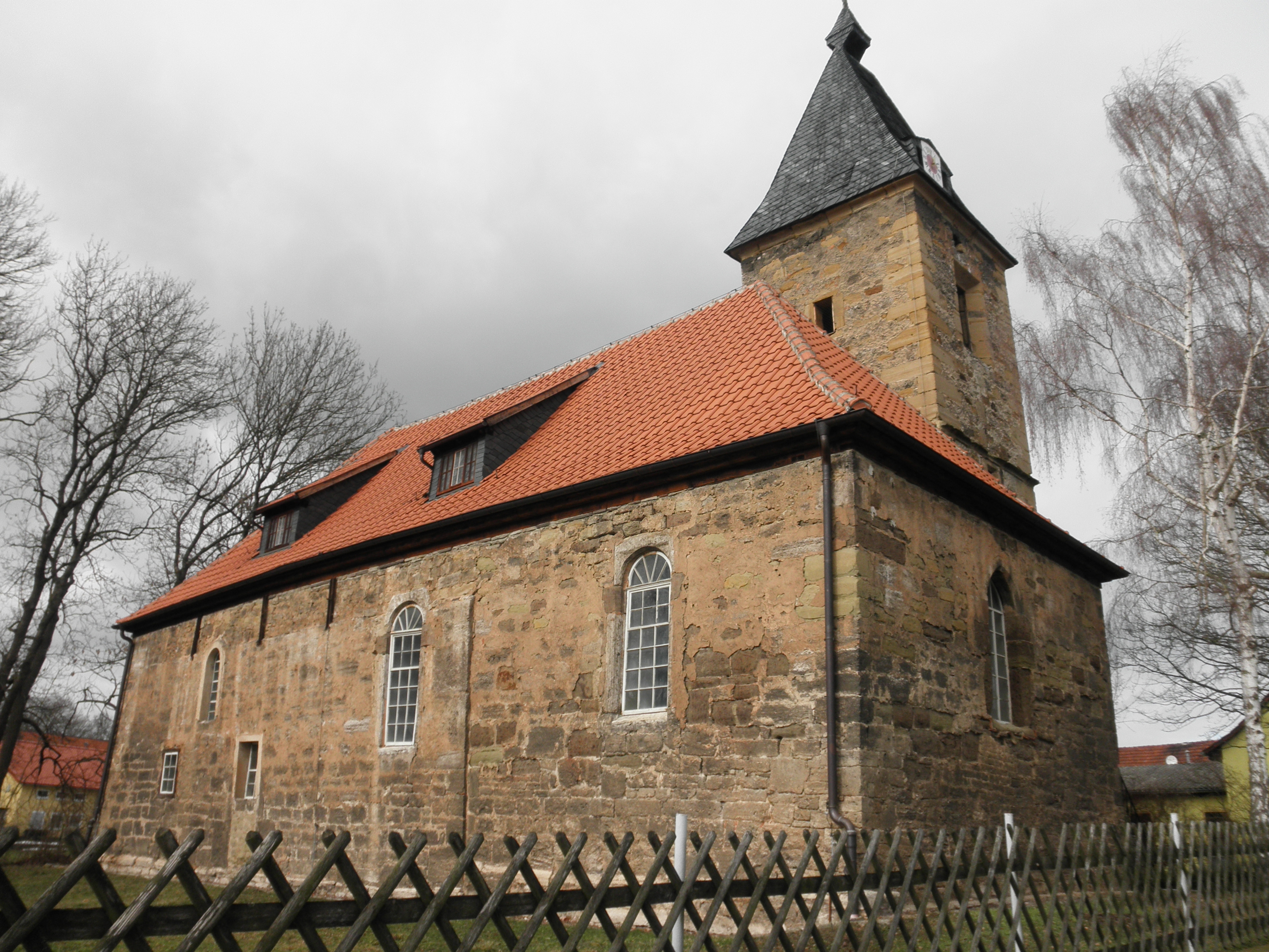 St.Aegidien-Kirche in Kleinballhausen